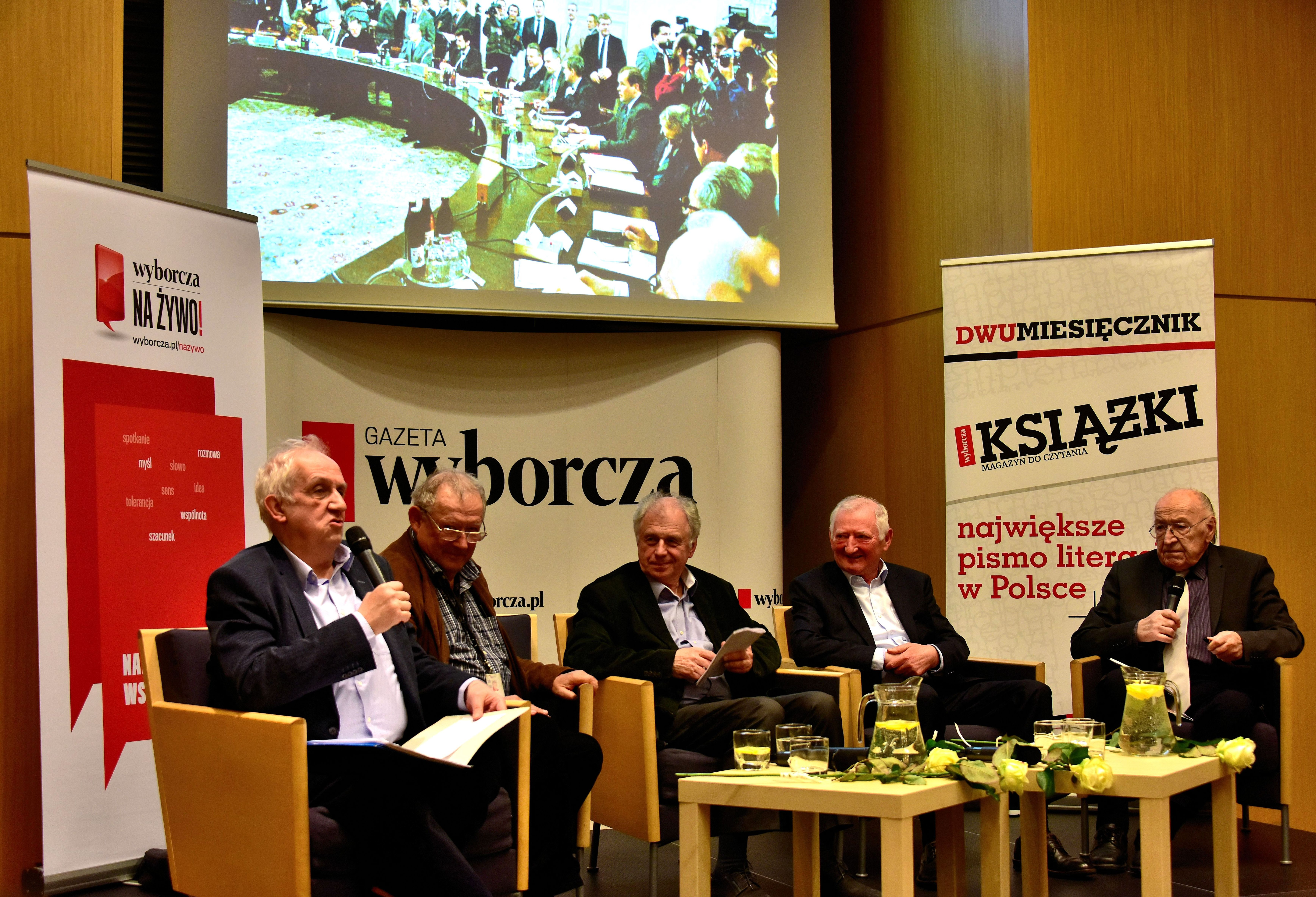 Debata Okrągły Stół - 30 lat później w redakcji "Gazety Wyborczej" przy ul. Czerskiej 8/10 w Warszawie. Siedzą od lewej: Andrzej Friszke, Adam Michnik, Bogdan Lis, Andrzej Gdula i Stanisław Ciosek